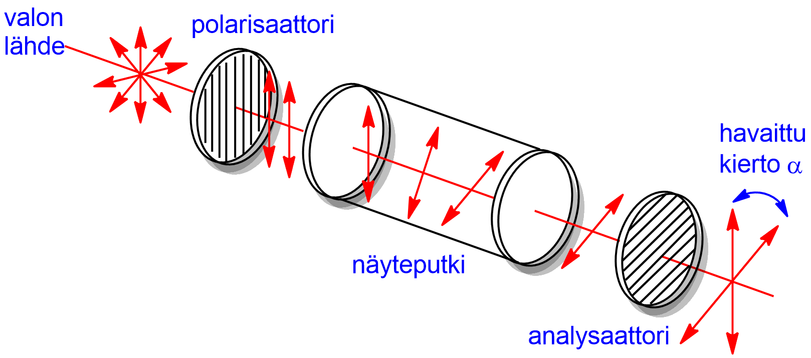 Polarimetrin rakenne piirretty ChemDraw-ohjelmalla